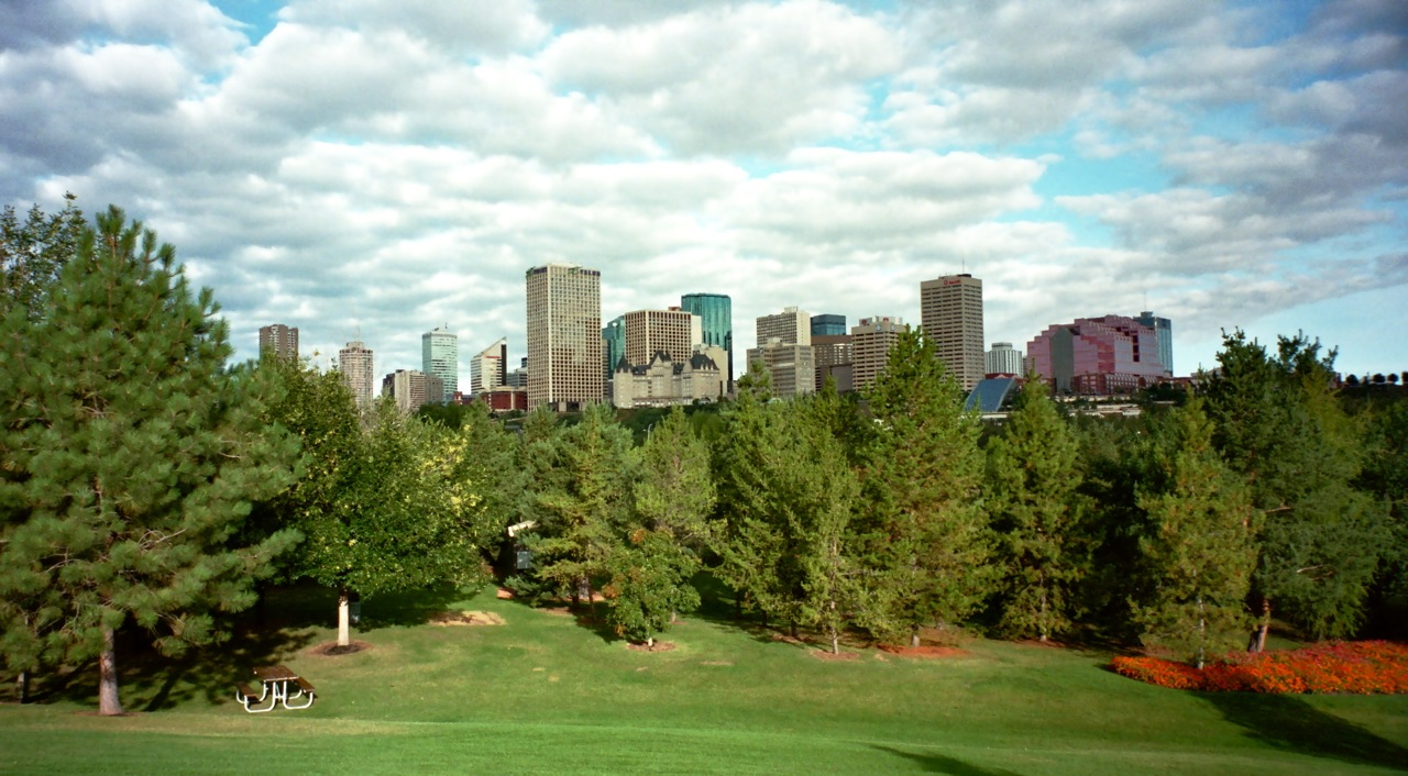 Edmonton (Downtown) von Südosten